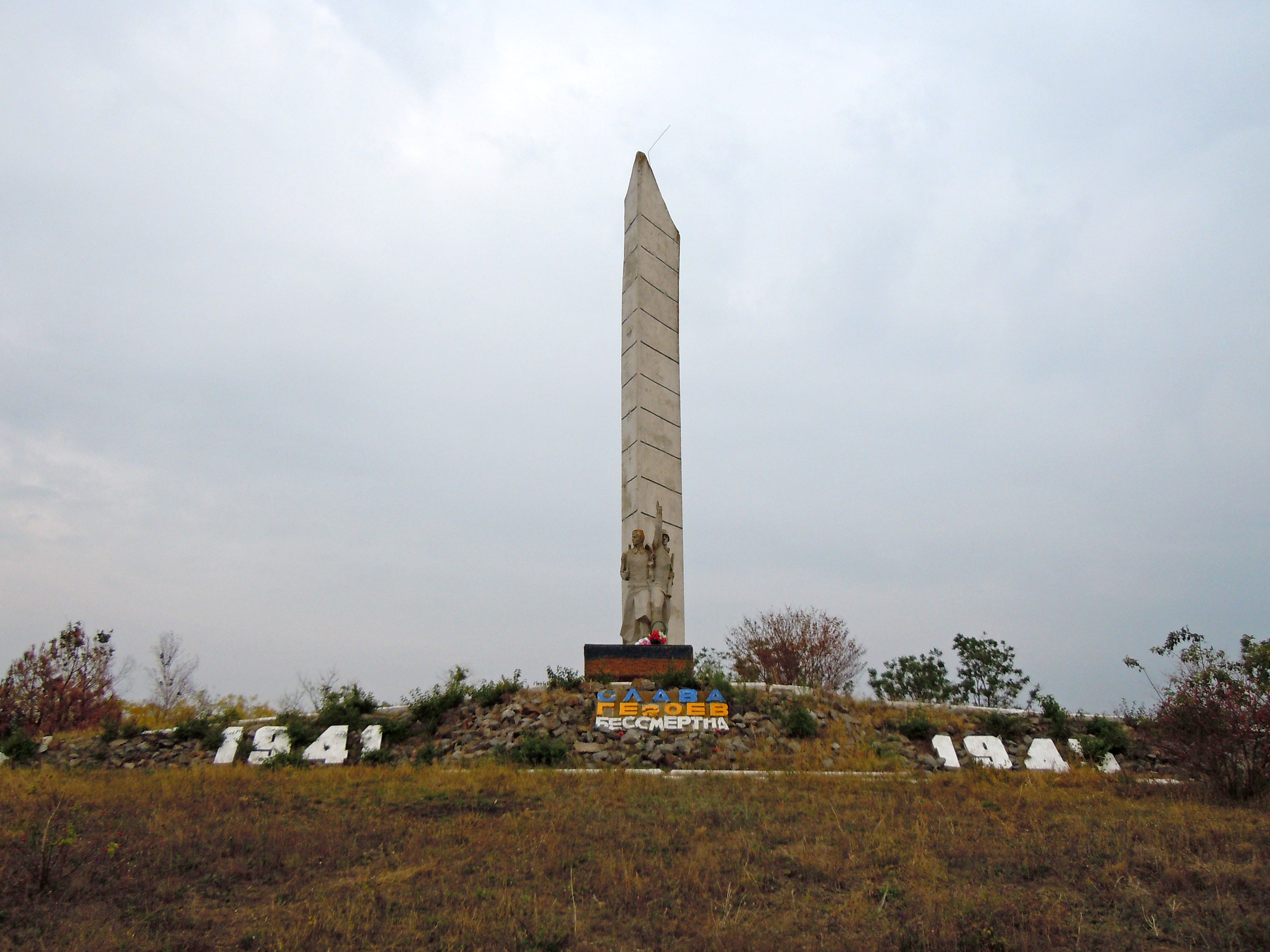 Курган Слави із обеліском на честь захисників Сарати, що загинули в період з 1941 по 1944 роки.